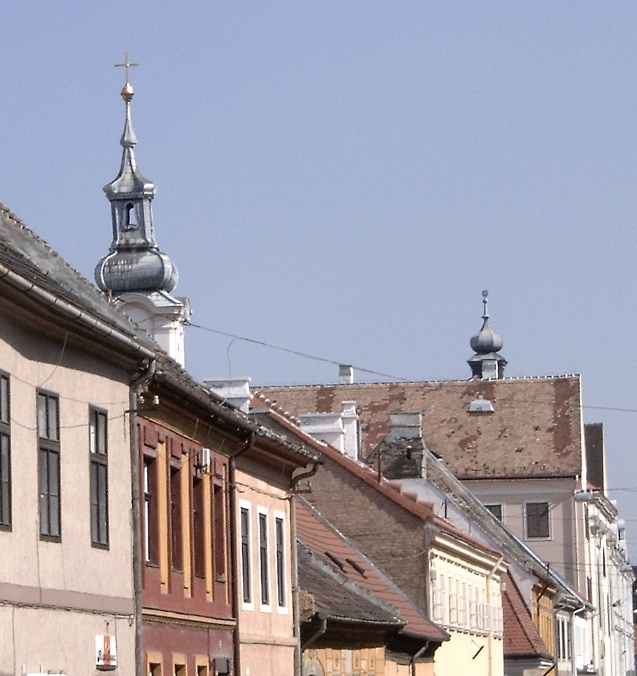 A Német Ispita és az Orsolyita templom